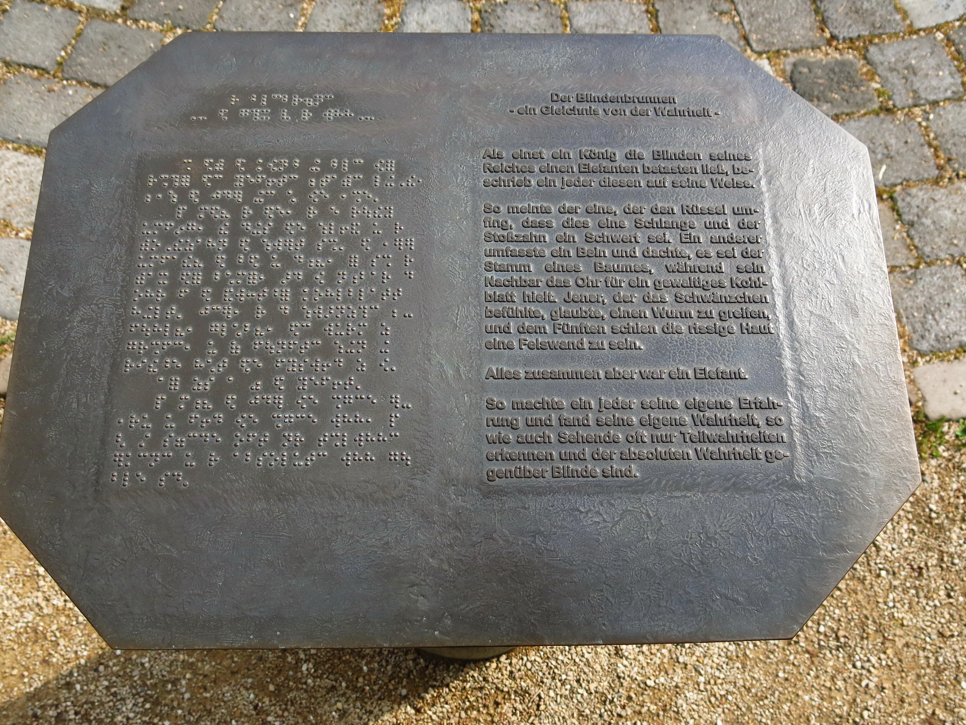 Blindengarten in der Bonner Rheinaue.